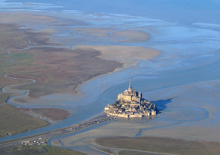 Mt_Saint_Michel.png